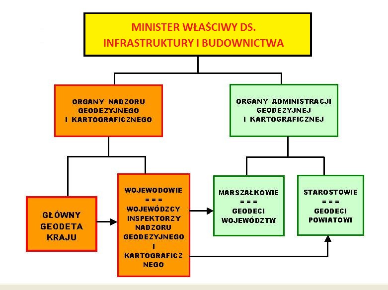 Nadzór GiK w Polsce od 2015 - diagram